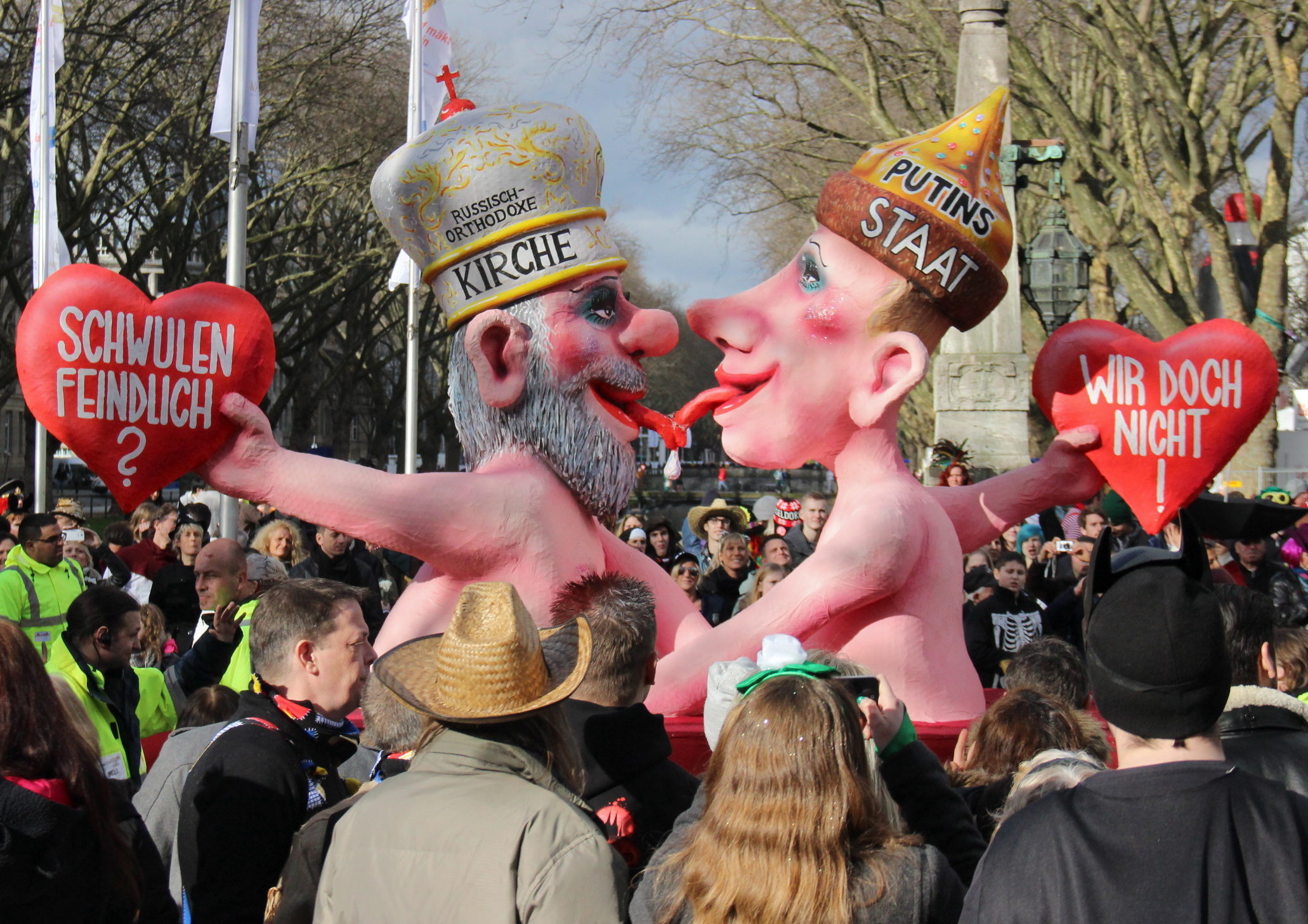 Düsseldorf Karneval 2014